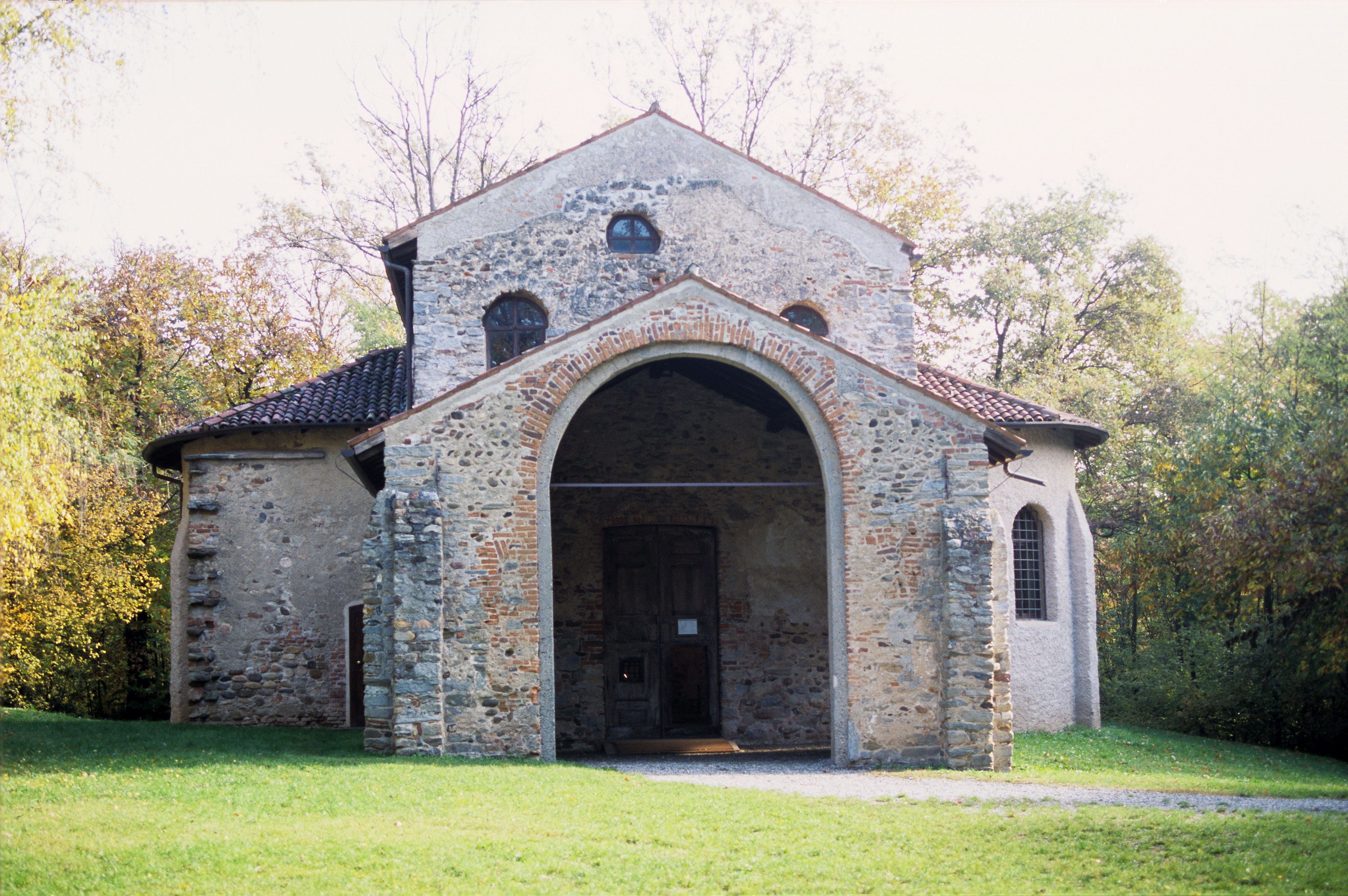 The Torba Tower, wall paintings’ detail